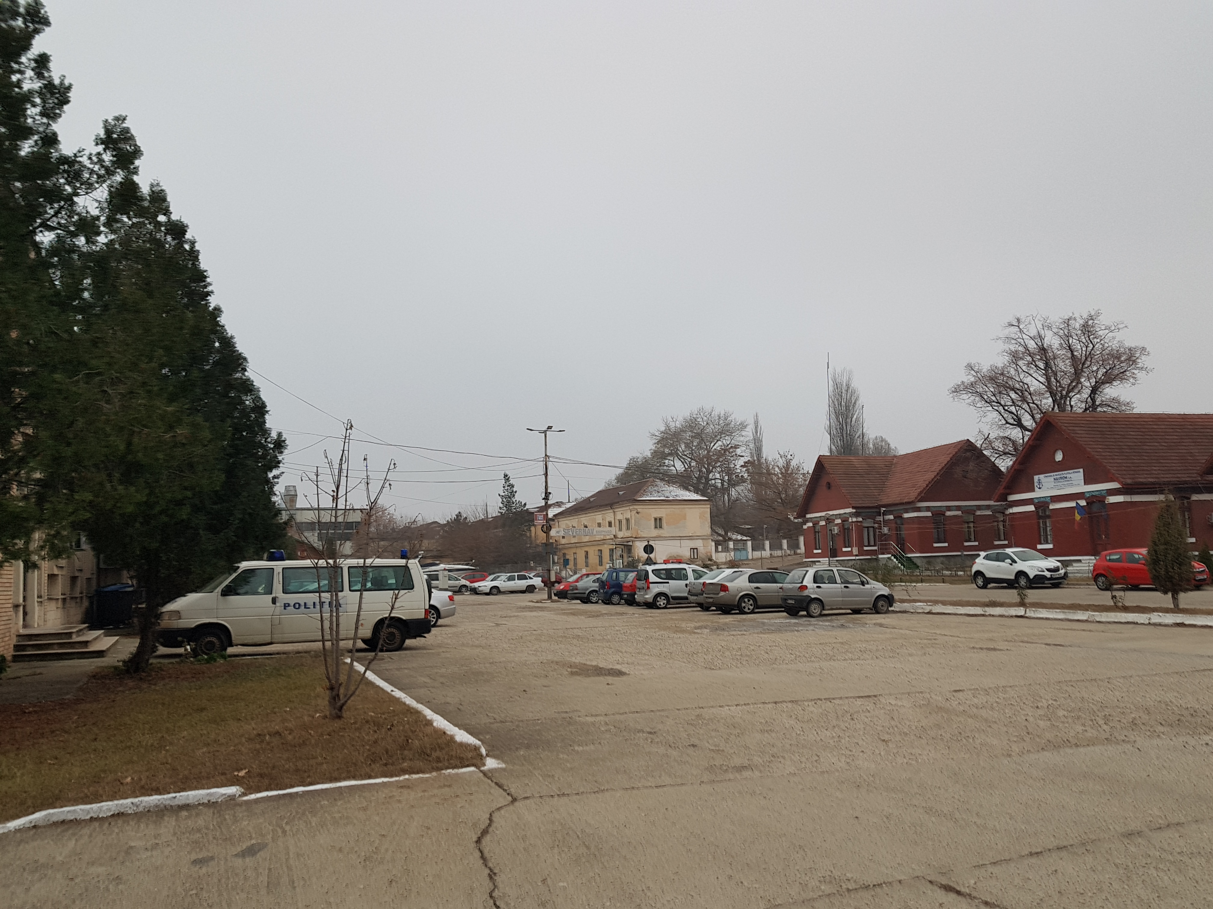 Fosta Administrația Portului, azi Autoritatea Navală Română (NFR), Vama Portului, A.F.D.J.A.C.N.